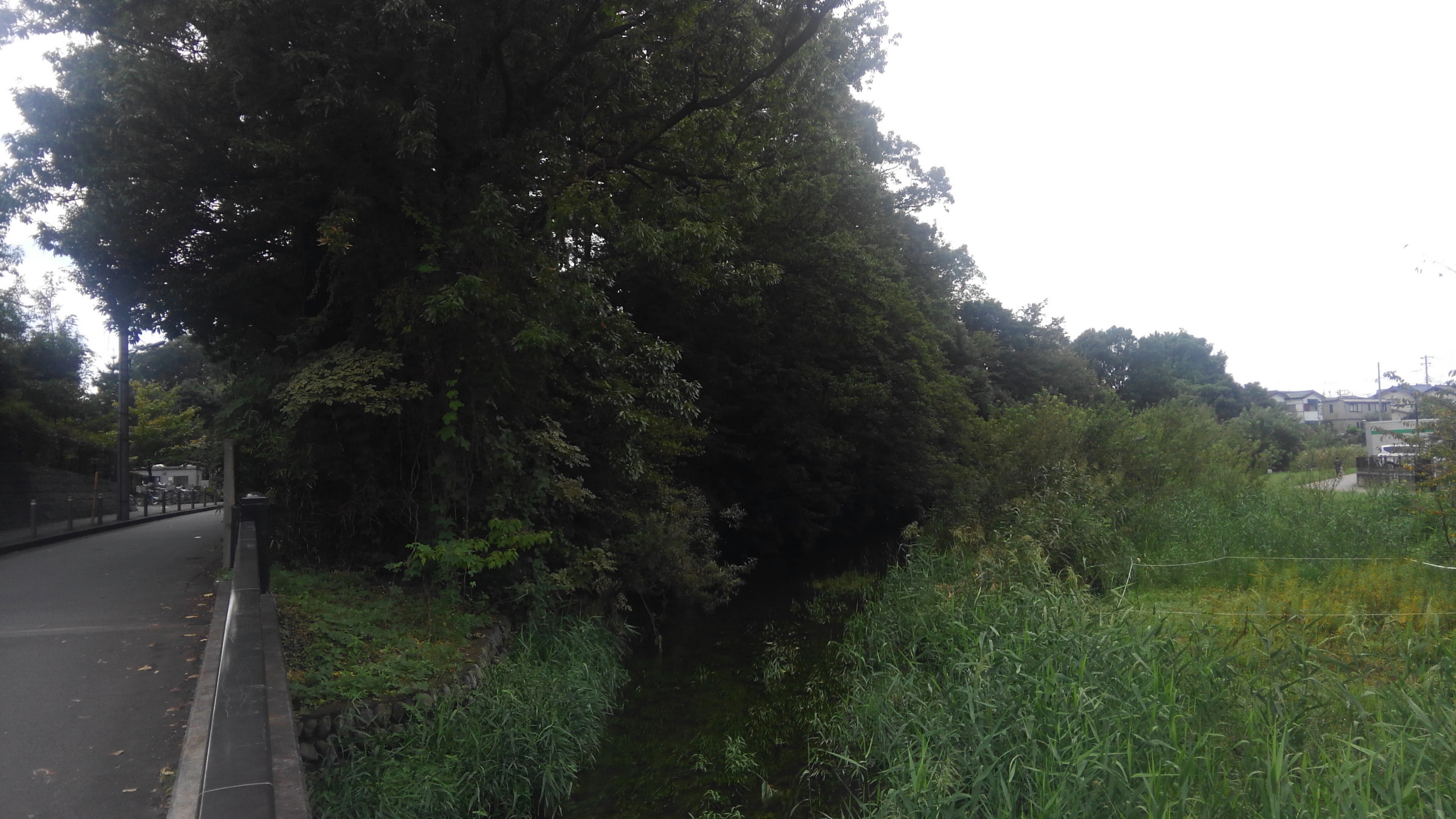 東京都東久留米市南沢氷川神社の裏側の森